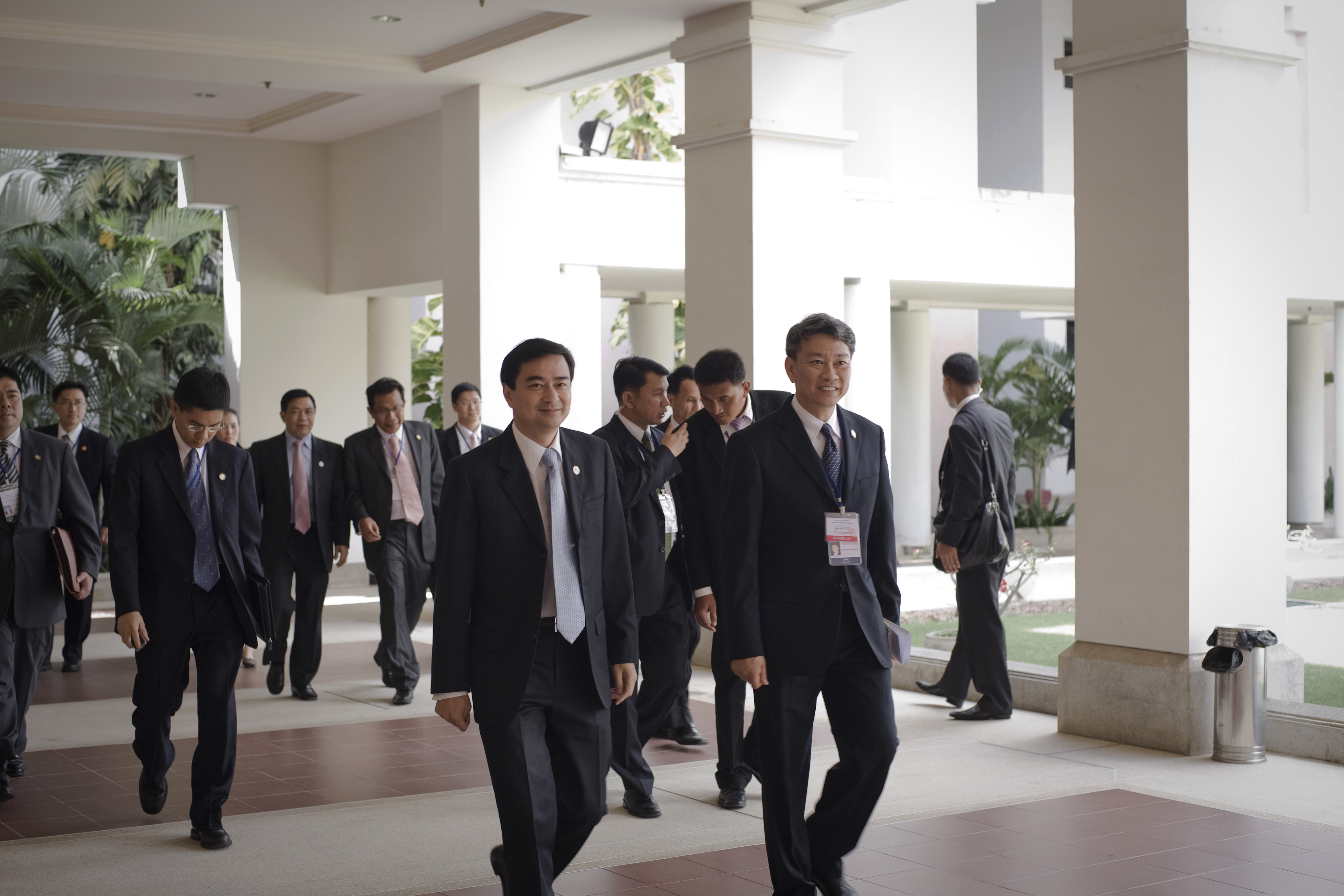 นายกรัฐมนตรีเป็นเจ้าภาพเลี้ยงอาหารกลางวันแก่คณะผู้แทนภาคเอกชนไทยที่เข้าร่วมการประชุม ACMECS Business Forum ณ สถานเอกอัครราชทูตไทย ณ กรุงพนมเปญ ราชอาณาจักรกัมพูชา วันพุธที่ 17 พฤศจิกายน พ.ศ.2553 (Photographer attached to the Prime Minister of the Kingdom of Thailand : Peerapat Wimolrungkarat / พีรพัฒน์ วิมลรังครัตน์) @is50mm